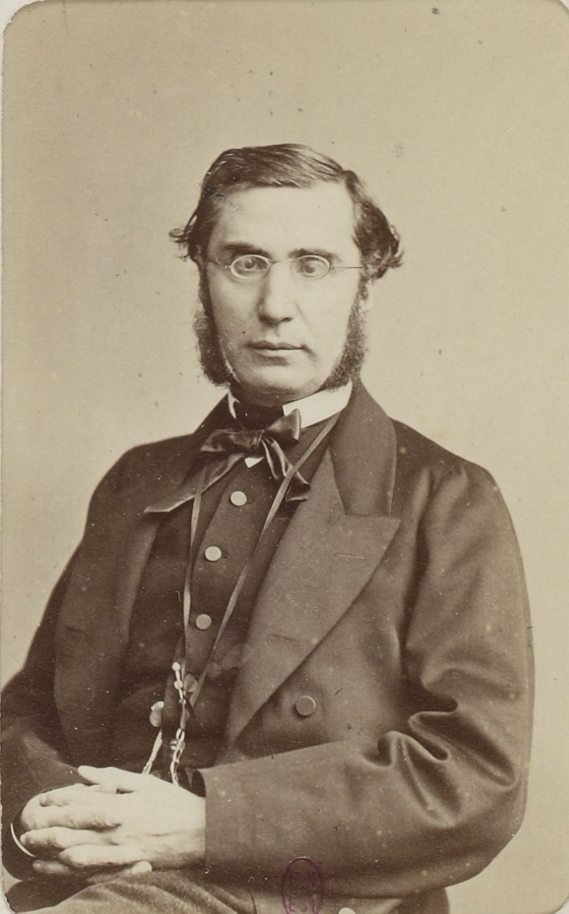 Personnalités françaises et étrangères sous le Second Empire. Émile Ollivier (Pierson phot.)